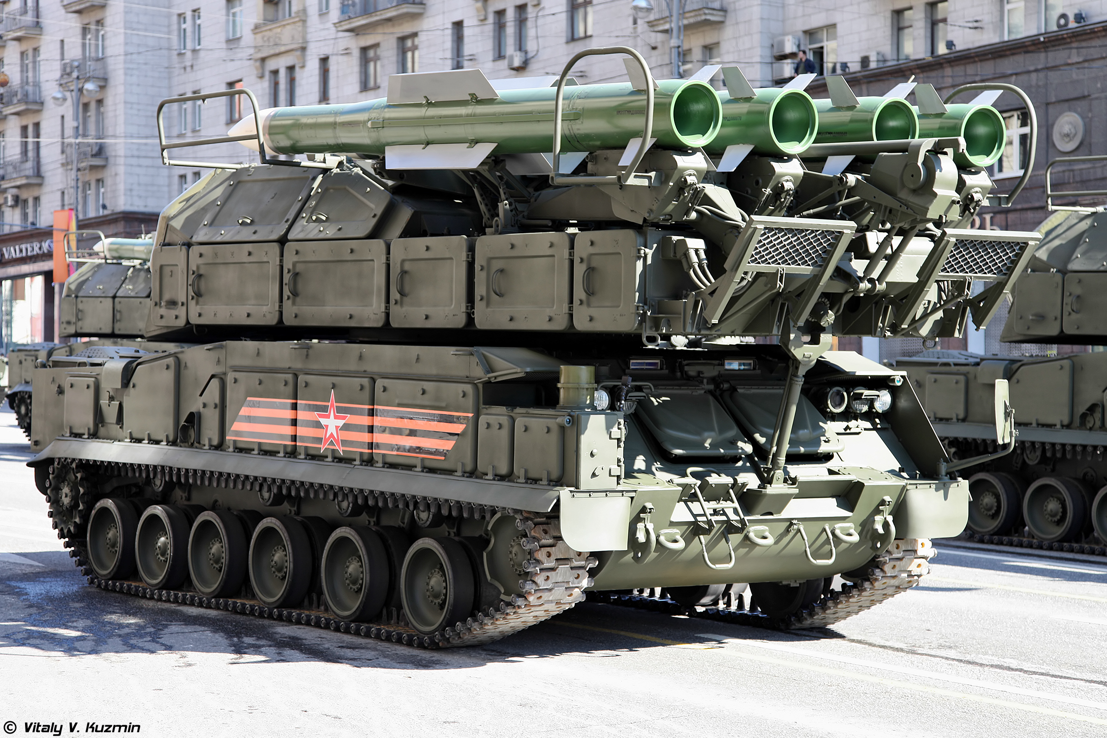 Самоходная огневая установка 9А317 ЗРК Бук-М2 (9A317 TELAR for Buk-M2 air defence system)